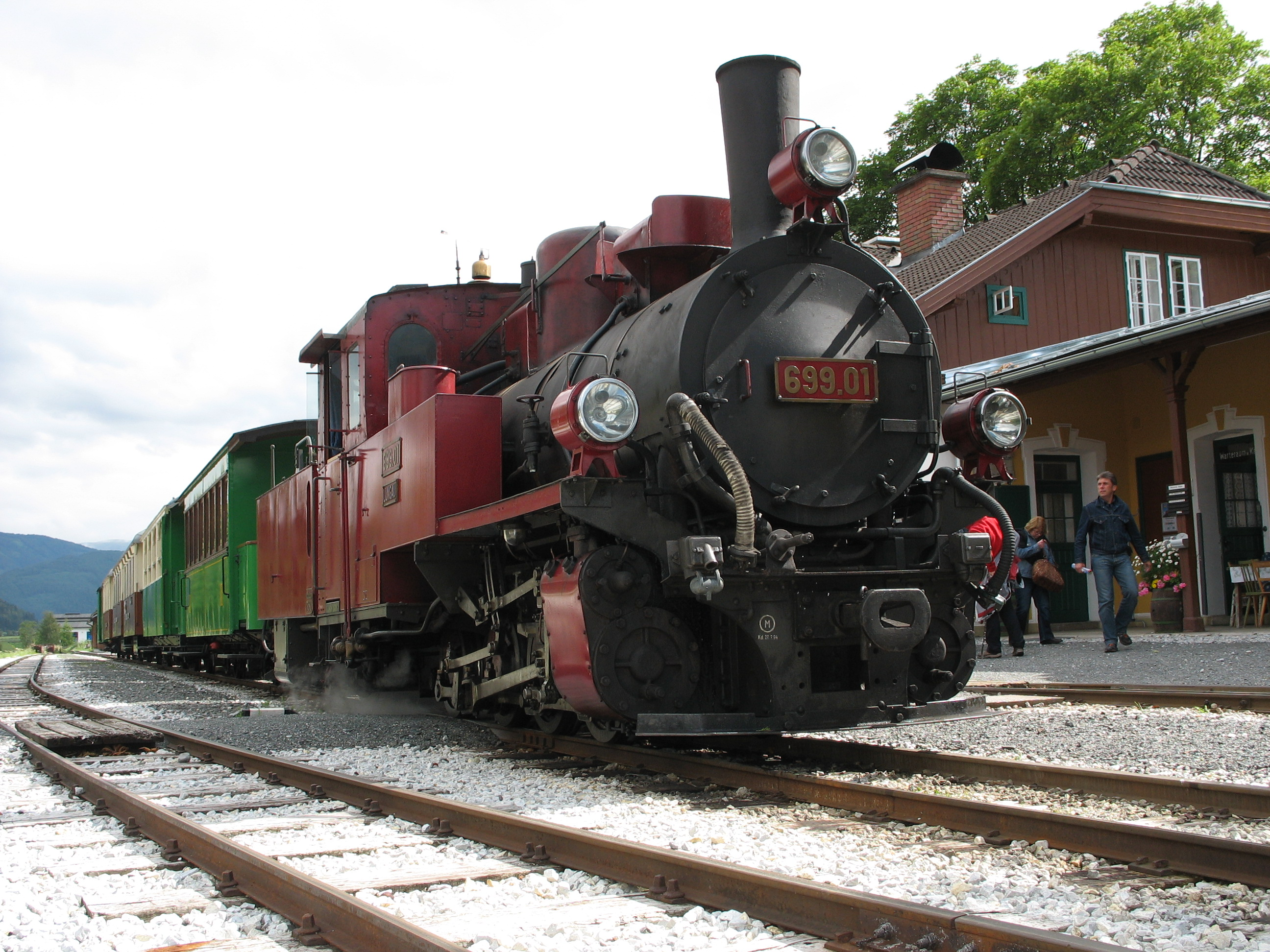 Die Dampflokomotive des Club 760 in Bahnhof Mauterndorf.